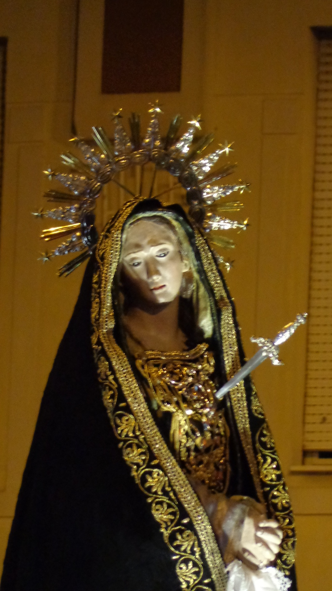 Pasqua 2016 67